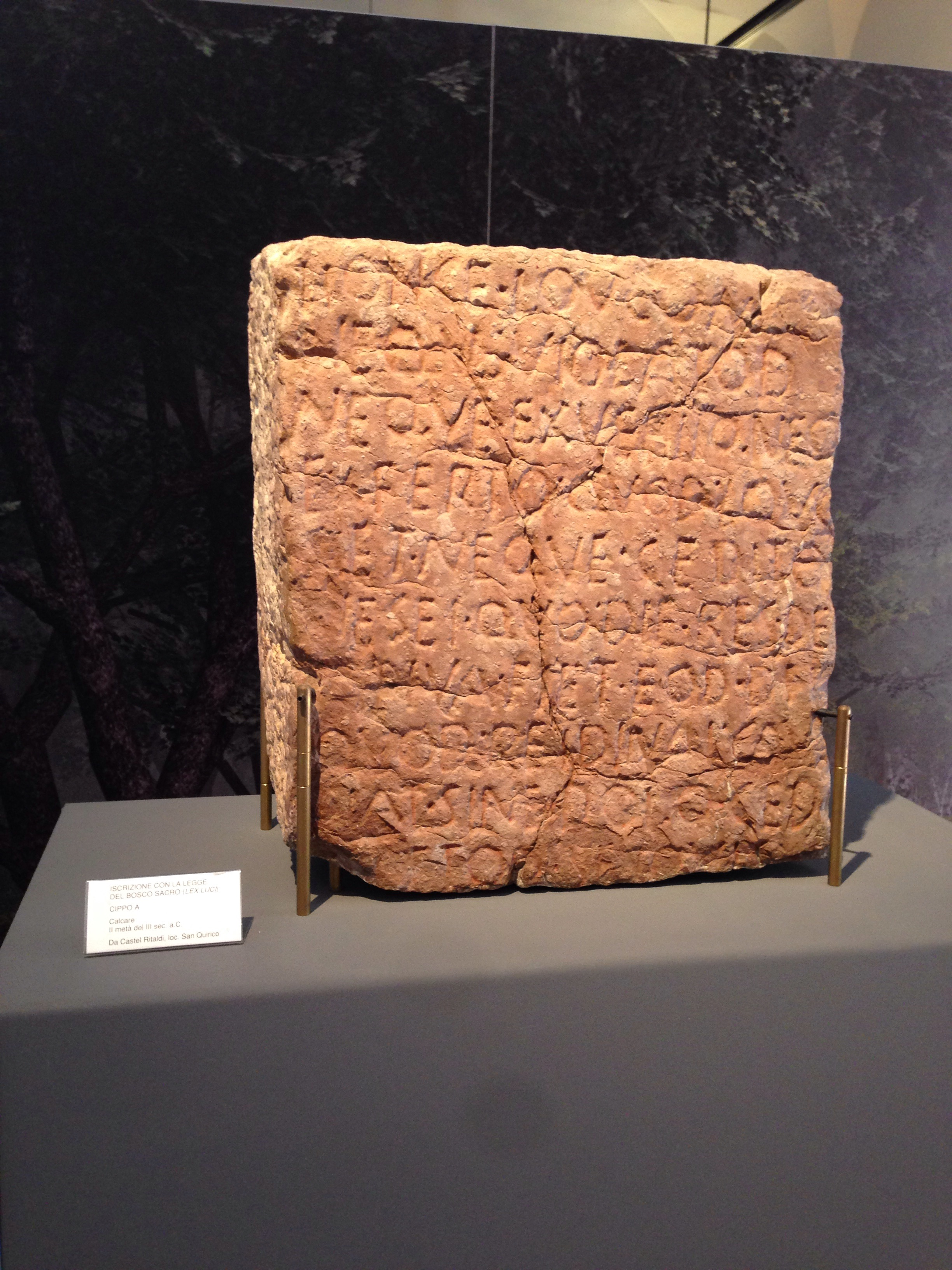 Museo archeologico Sant'Agata (Spoleto)